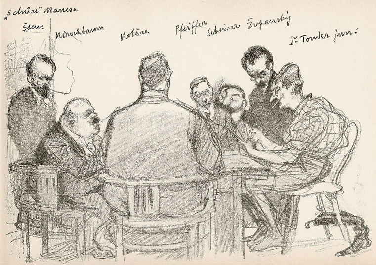 Hugo Boettinger - výtvarníci u stolu, kresba